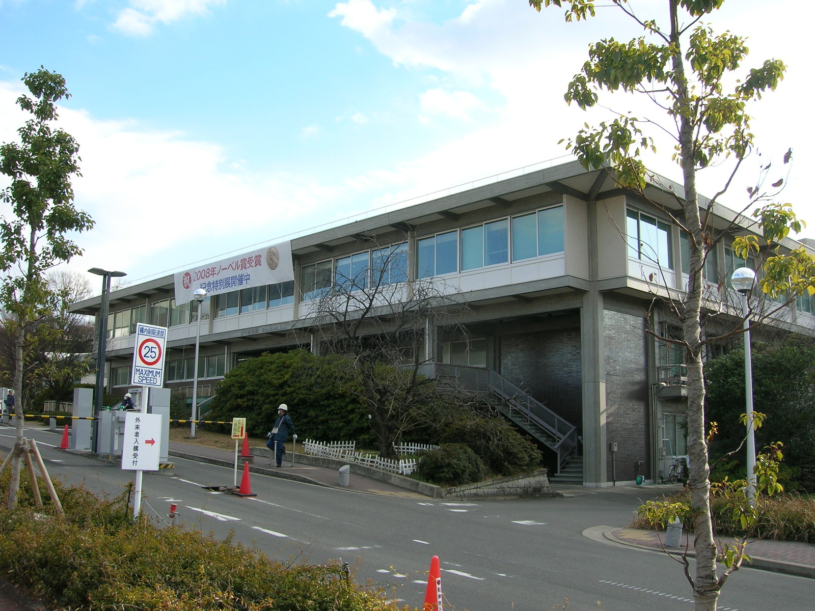 Nagoya Daigaku Hakubutsukan (Nagoya University Museum). Loc: Chikusa-ku, Nagoya city, Aichi Prefecture, Japan. 名古屋大学博物館 撮影場所 愛知県名古屋市千種区